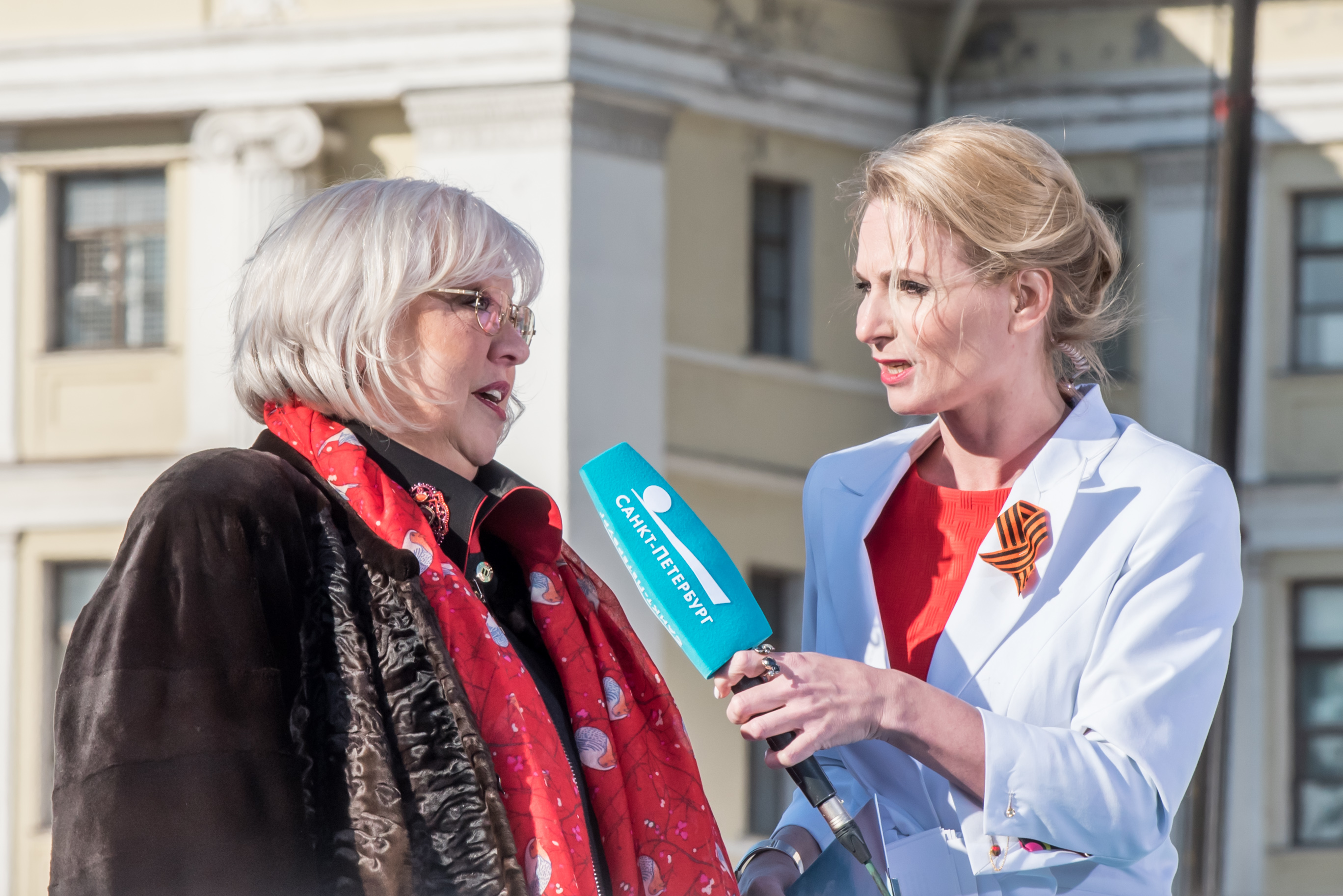 Концерт в СПб на Дворцовой в День Победы 2019 интервью Светлана Крючкова